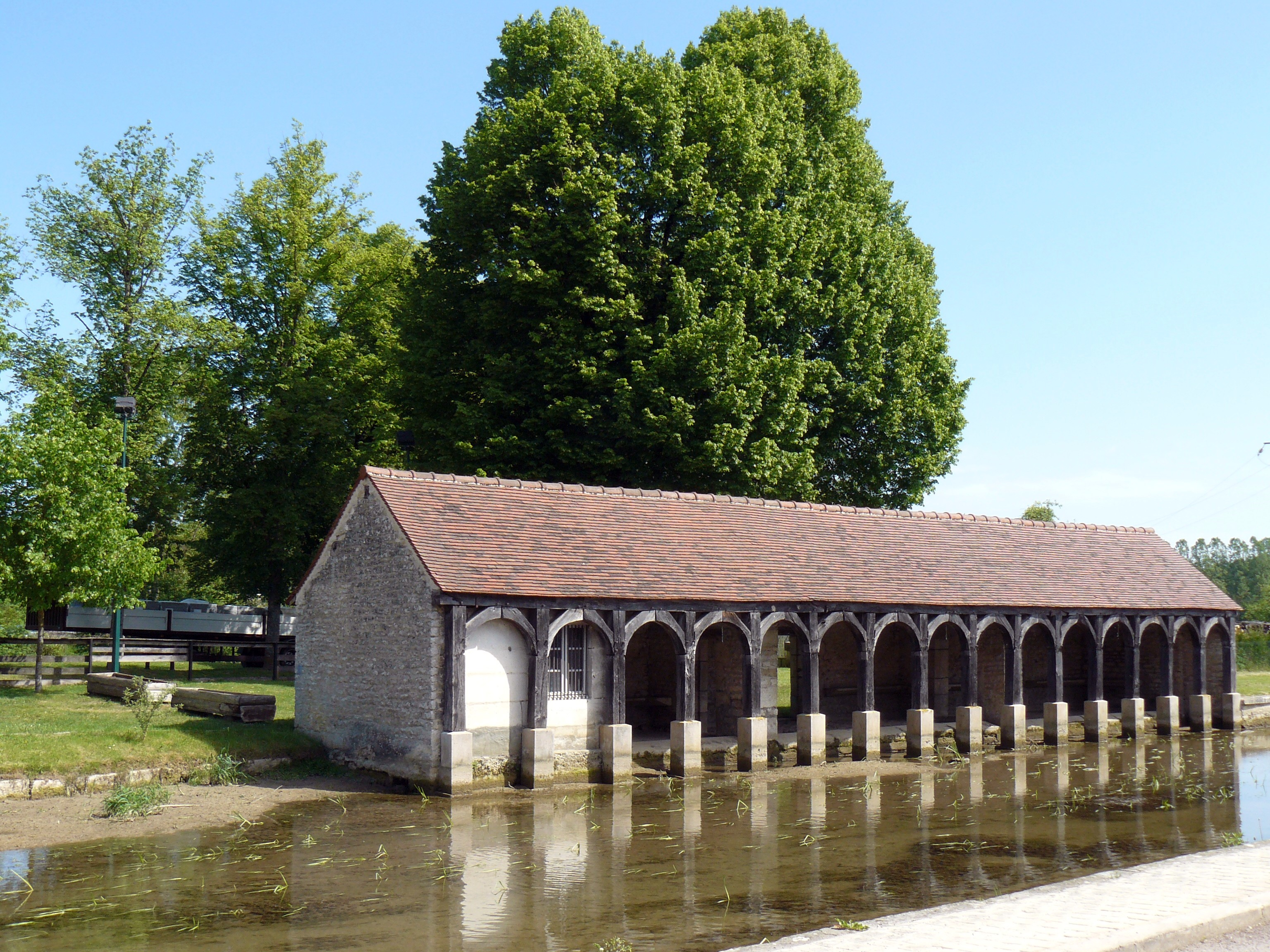 Lavoir à Vanvey (Côte-d'Or, France), sur l'Ource. XVIIIe siècle.